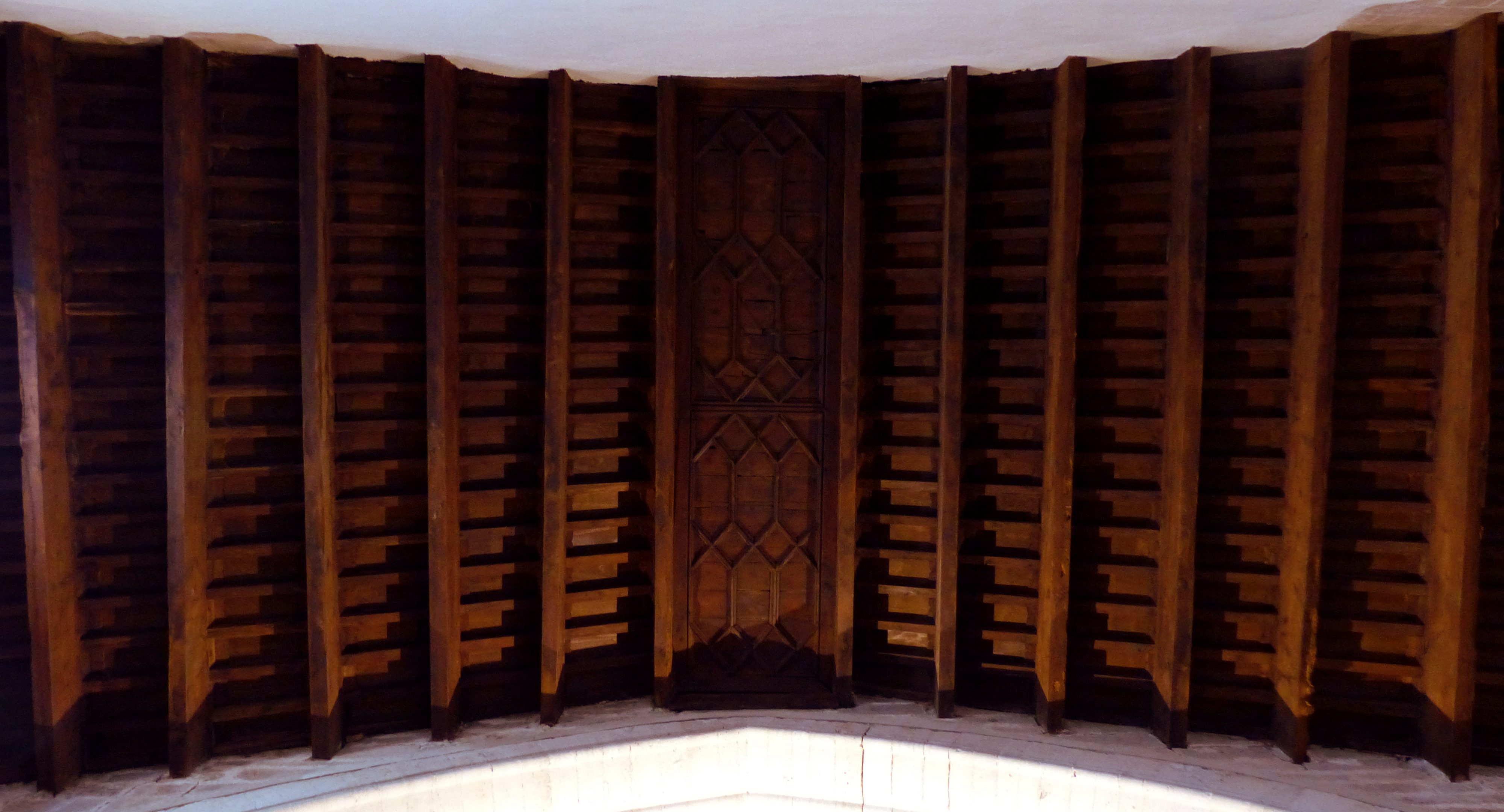 Parroquia de Catí. Alfarje medieval